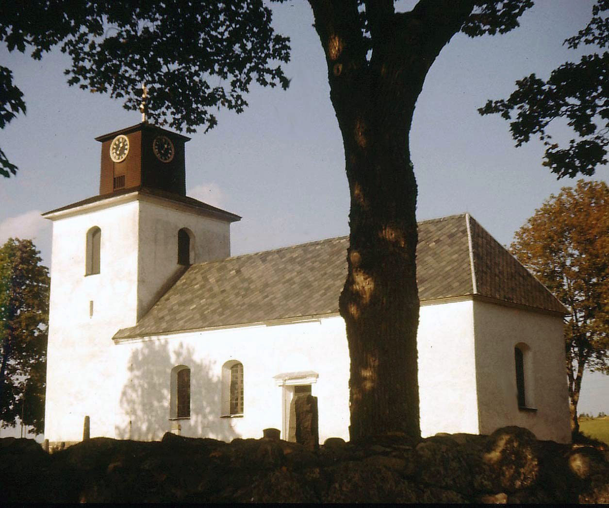 Skepperstad kyrka.